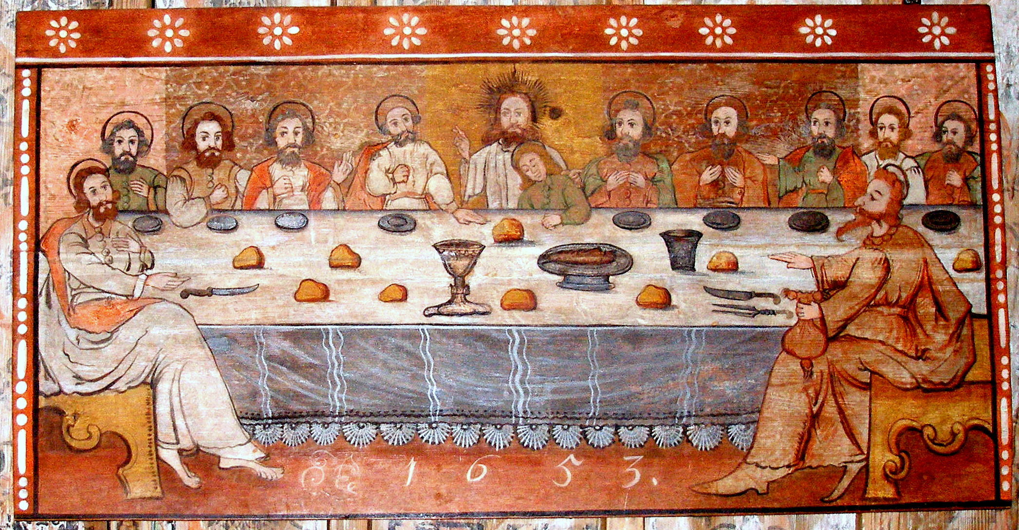 Obraz Posledná večera z roku 1653, od neznámeho autora. Drevený, gotický rímskokatolícky kostol z konca 15. storočia predstavuje najstarší typ na Slovensku. Interiér prešiel viacerými zmenami vo výzdobe, hlavne cez obdobie reformácie, kedy pribudli vzácne reformačné pamiatky, napríklad tabuľový obraz Posledná večera , či nástenné maľby z roku 1665. Od roku 1968 je kostolík a jeho múr národnou kultúrnou pamiatkou. V roku 2008 bol zapísaný do zoznamu Svetového dedičstva UNESCO. Obec Hervartov, okres Bardejov.